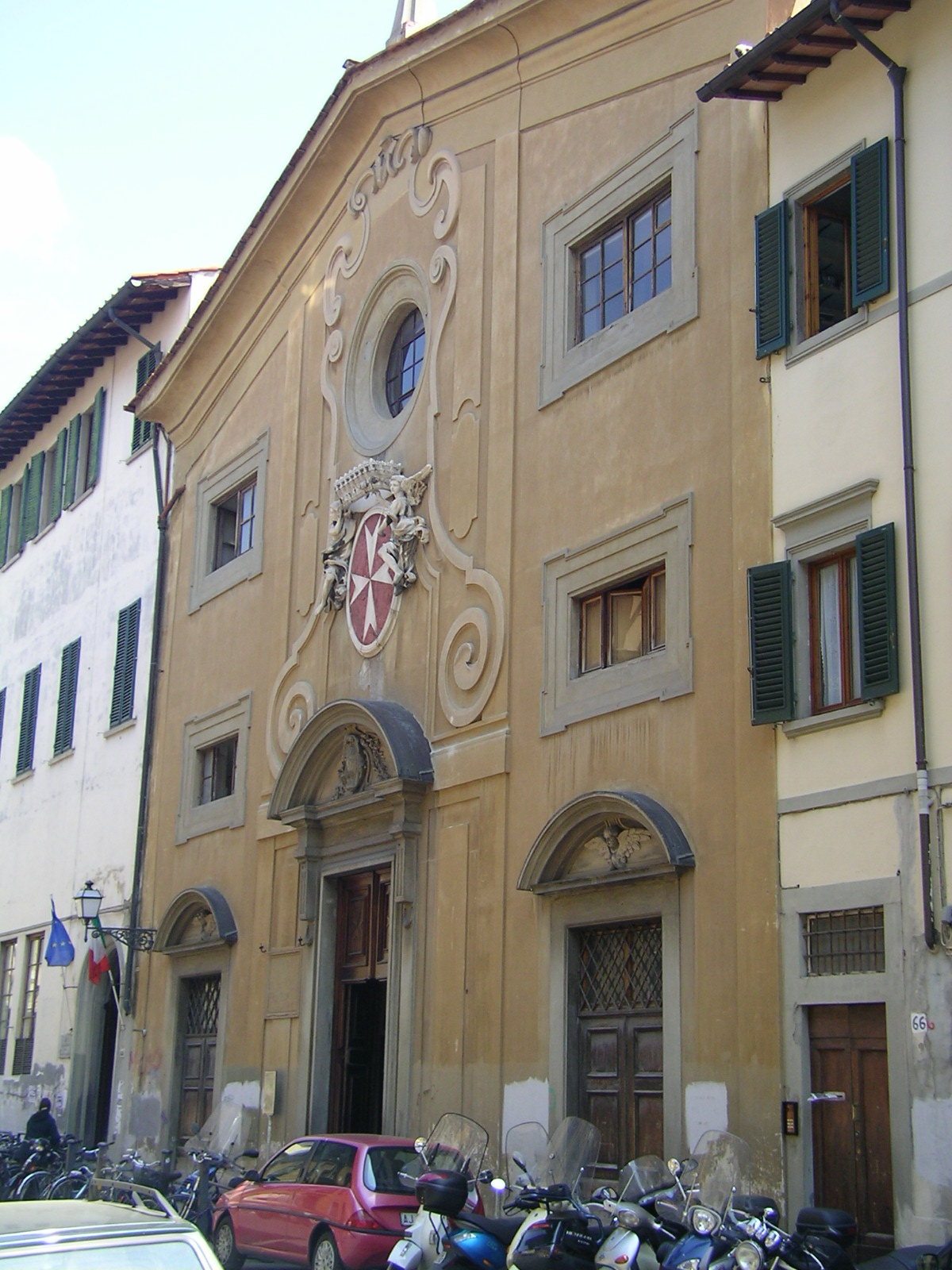 San Giovannino dei Cavalieri, front view in Florence, Italy